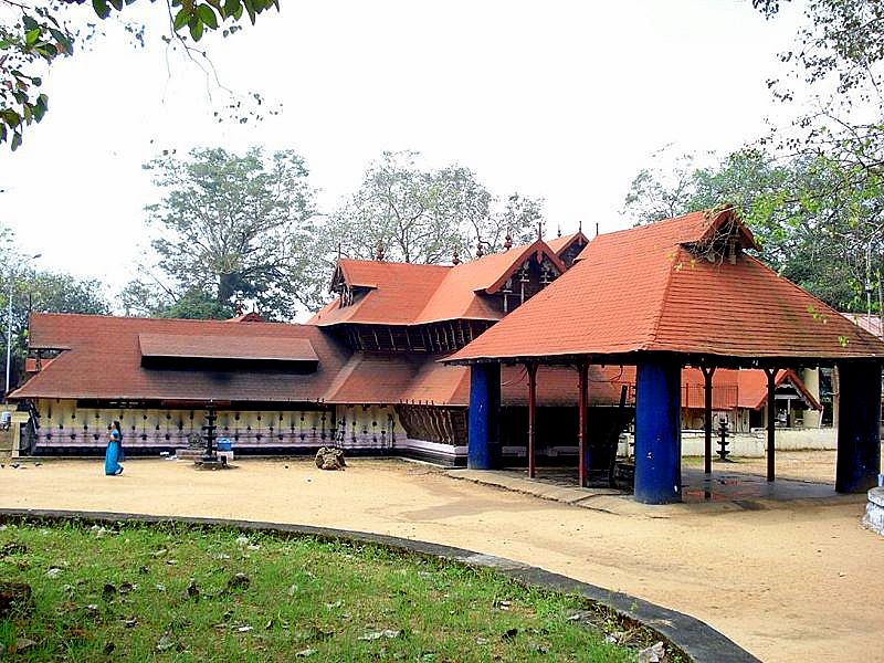 കിഴക്കെ നട,കുരുംബ ഭഗവതി ക്ഷേത്രം,കൊടുങ്ങല്ലൂർ